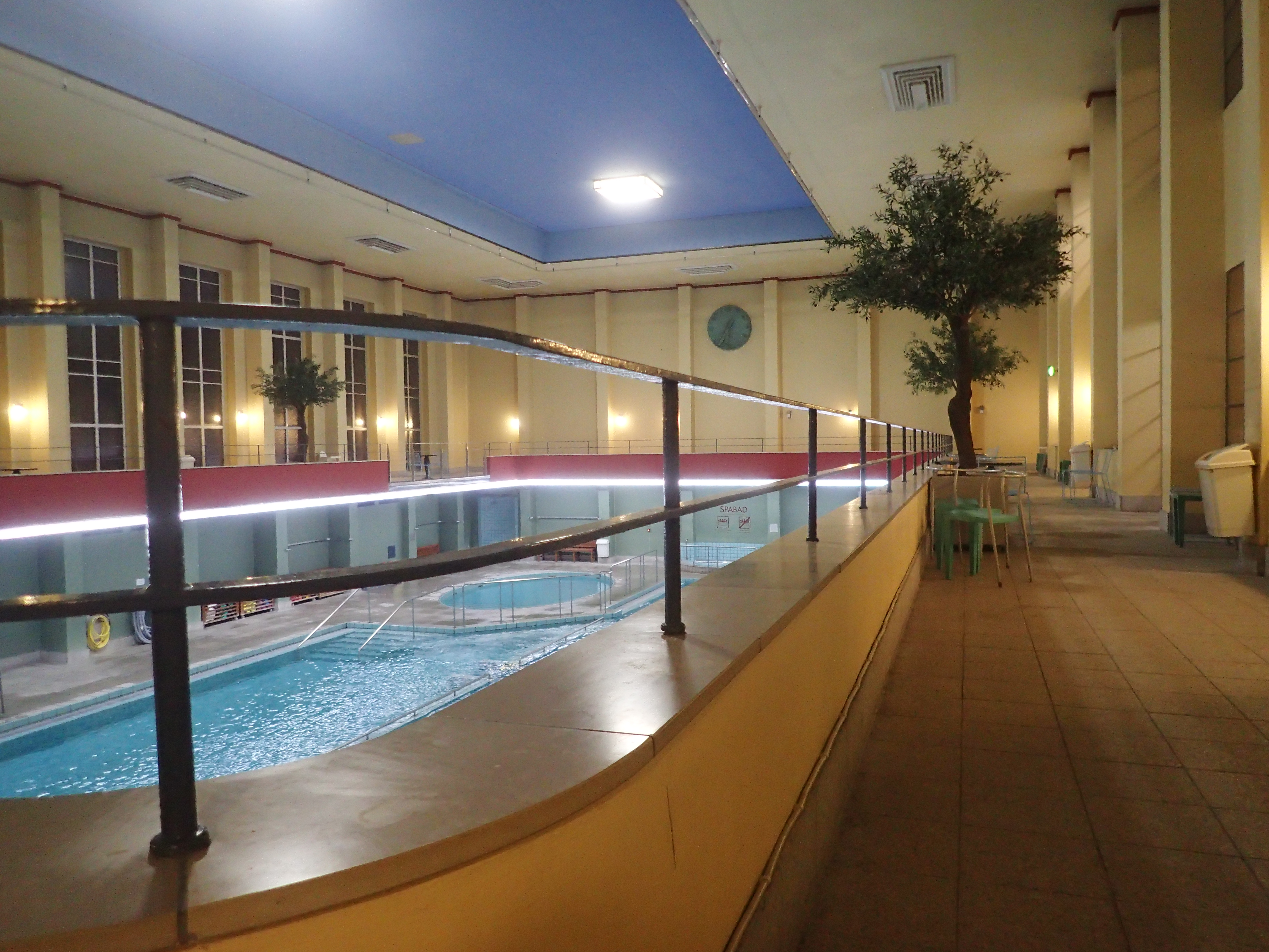 Svømmehallen i Badeanstalten Spanien. Balkonen.